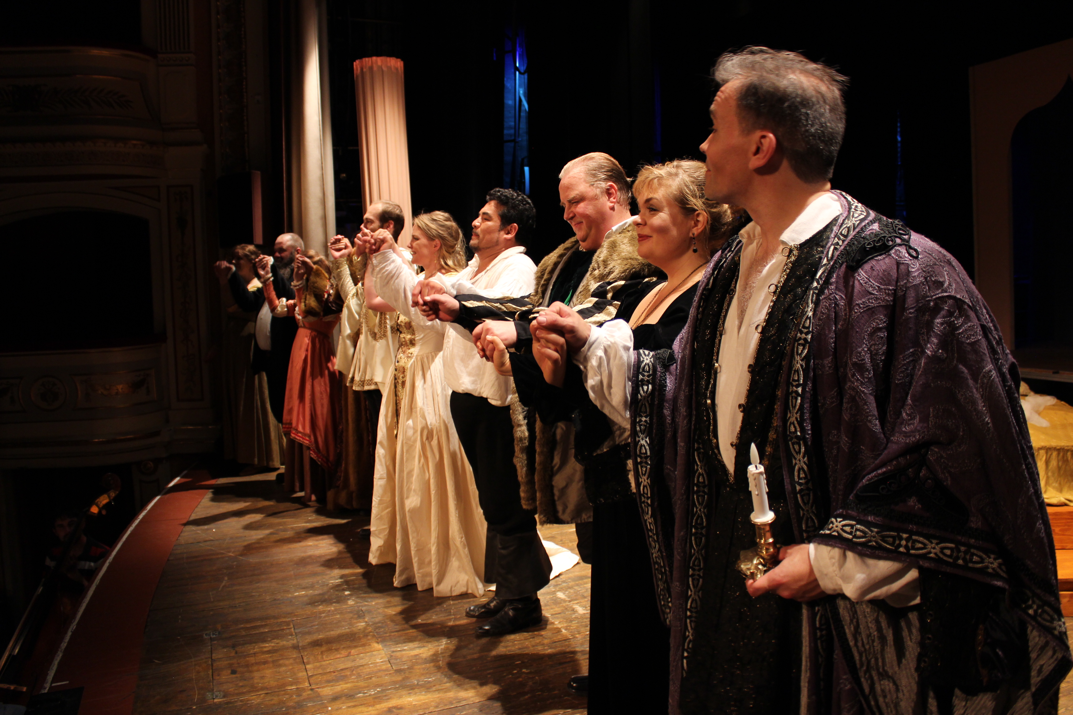 Bengt Krantz med ensemblen av Otello, efter en föreställning med Operafabriken på Ystads Teater, sommaren 2016. Foto: Maria Hegborn.